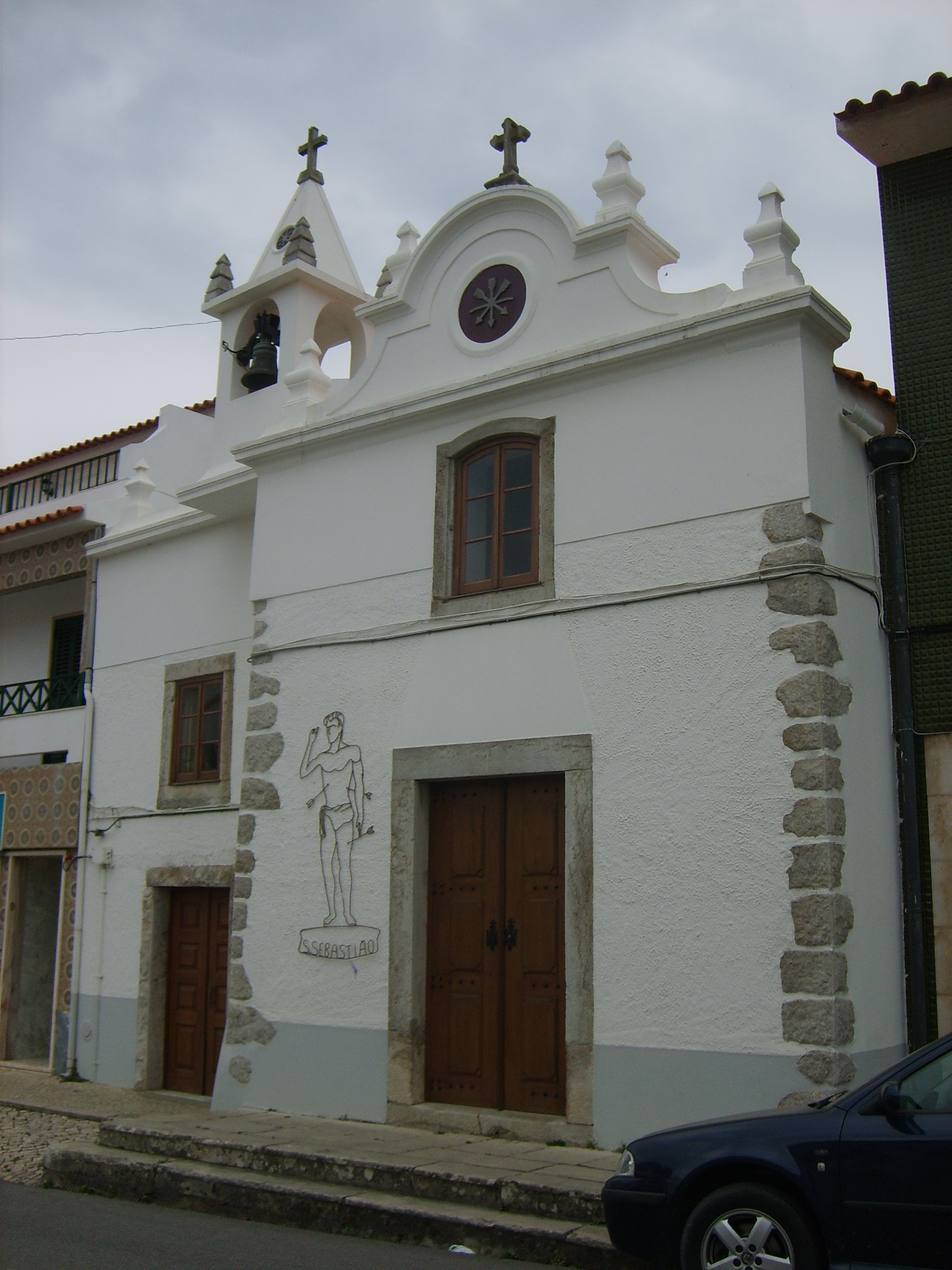 Lourinhã